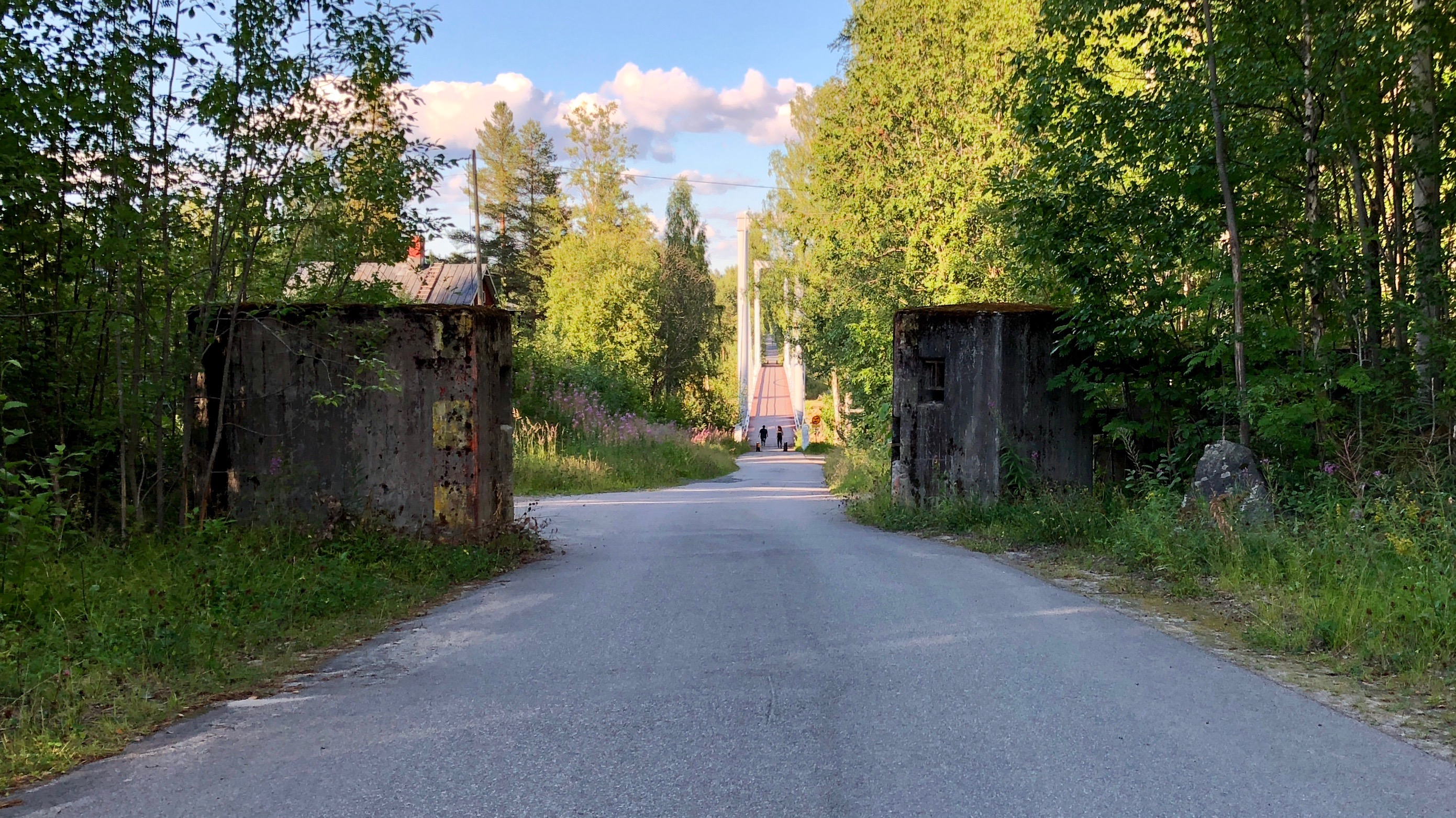 Gammal vägspärr/väghinder vid svedjebron i Boden. Vägspärrar av den här typen var vanliga längs vägarna i Norrbotten ända in på 1970-talet och består av stålbalkar genom kraftiga betongstöd.